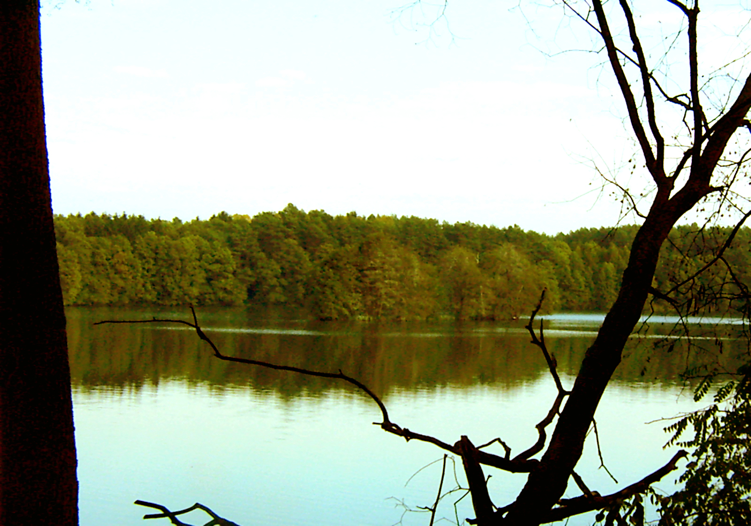 Puszcza Notecka, Jez. Kubek (Notecka Forest, Lake Kubek)